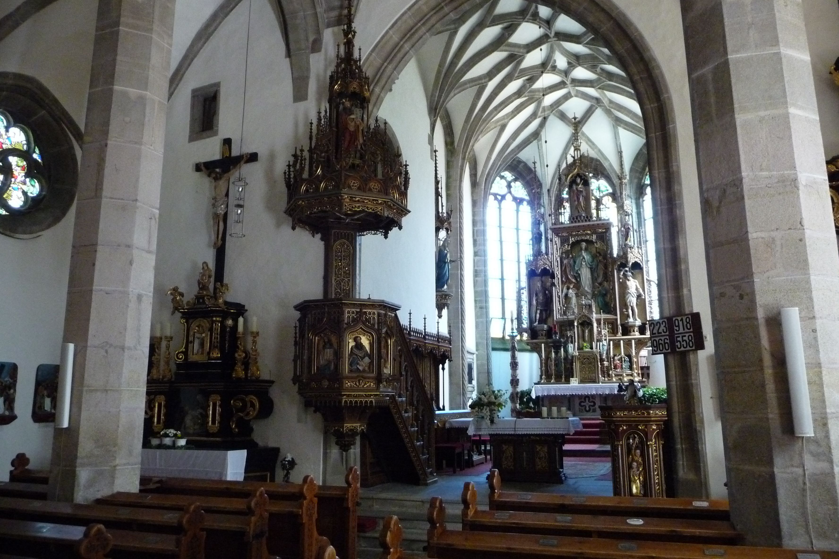 Ansicht Hochaltar und Kanzel der Pfarrkirche Hirschbach Mkr.